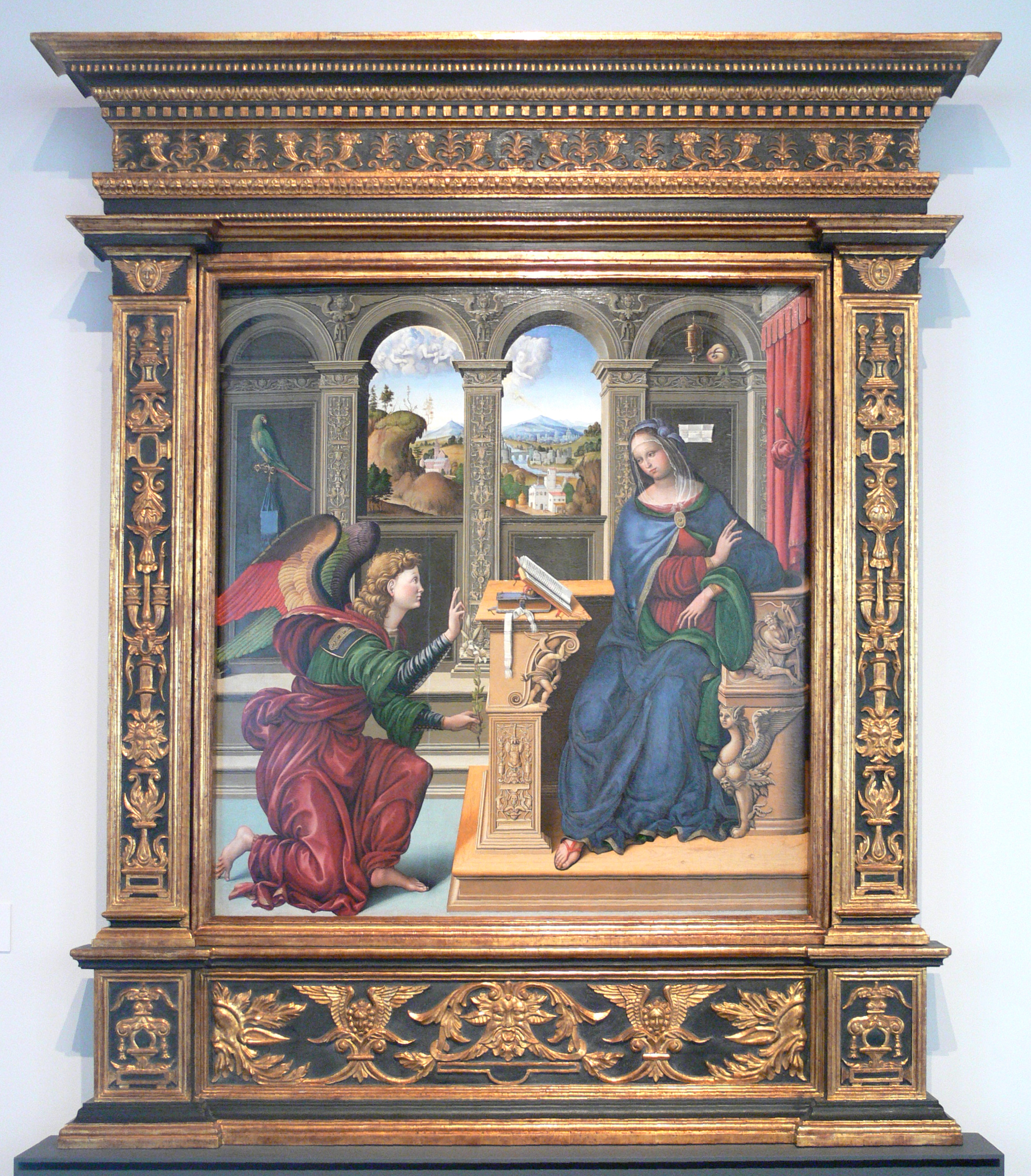 Gemäldegalerie Berlin (Kat. III. 098)